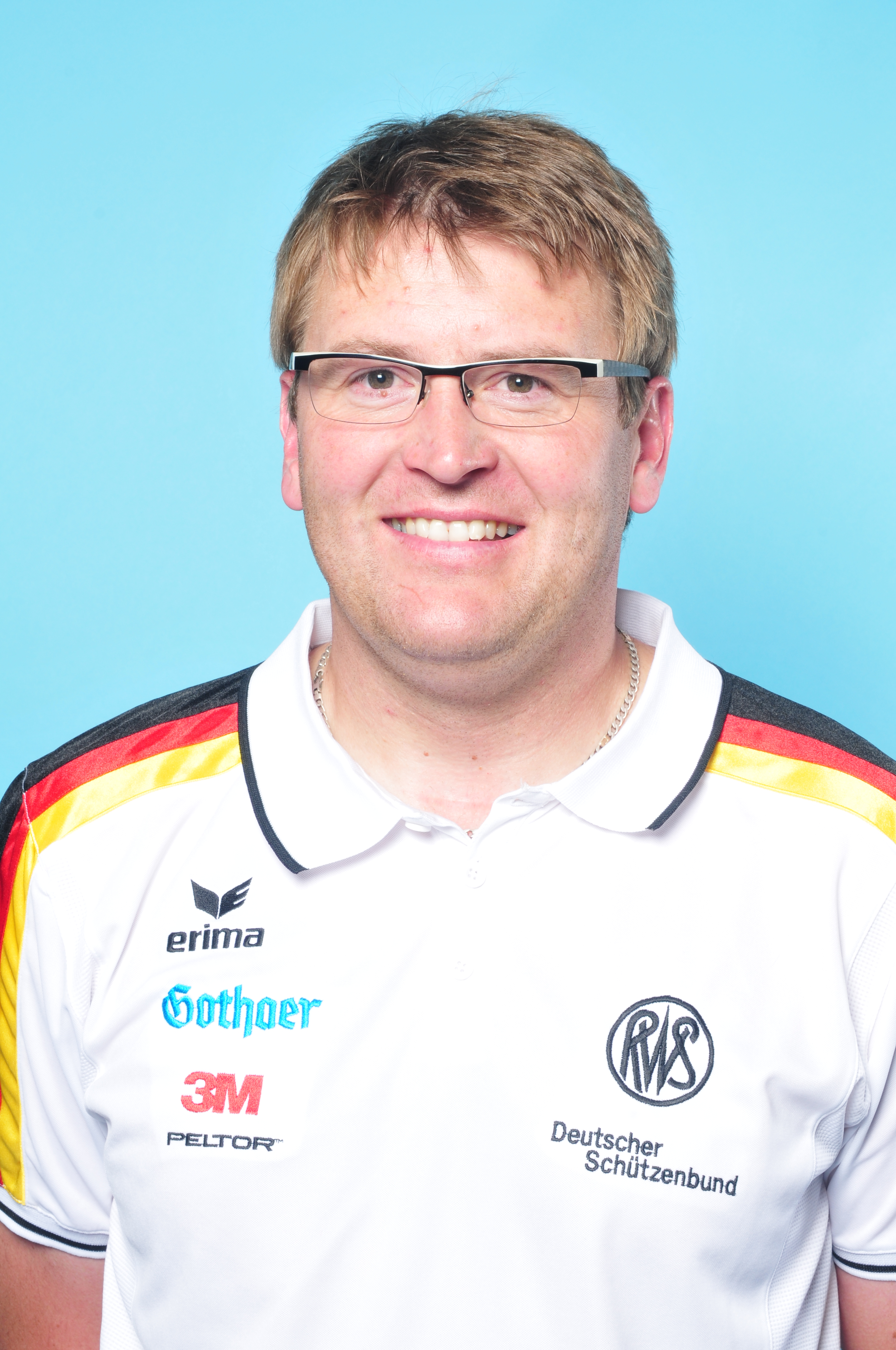 Einkleidung der deutschen Olympiamannschaftam 28. Juni 2012 in Mainz - Olympische Sommerspiele 2012 Cirdan Marcus Cyron Olaf Kosinsky Ralf Roletschek Sven Teschke